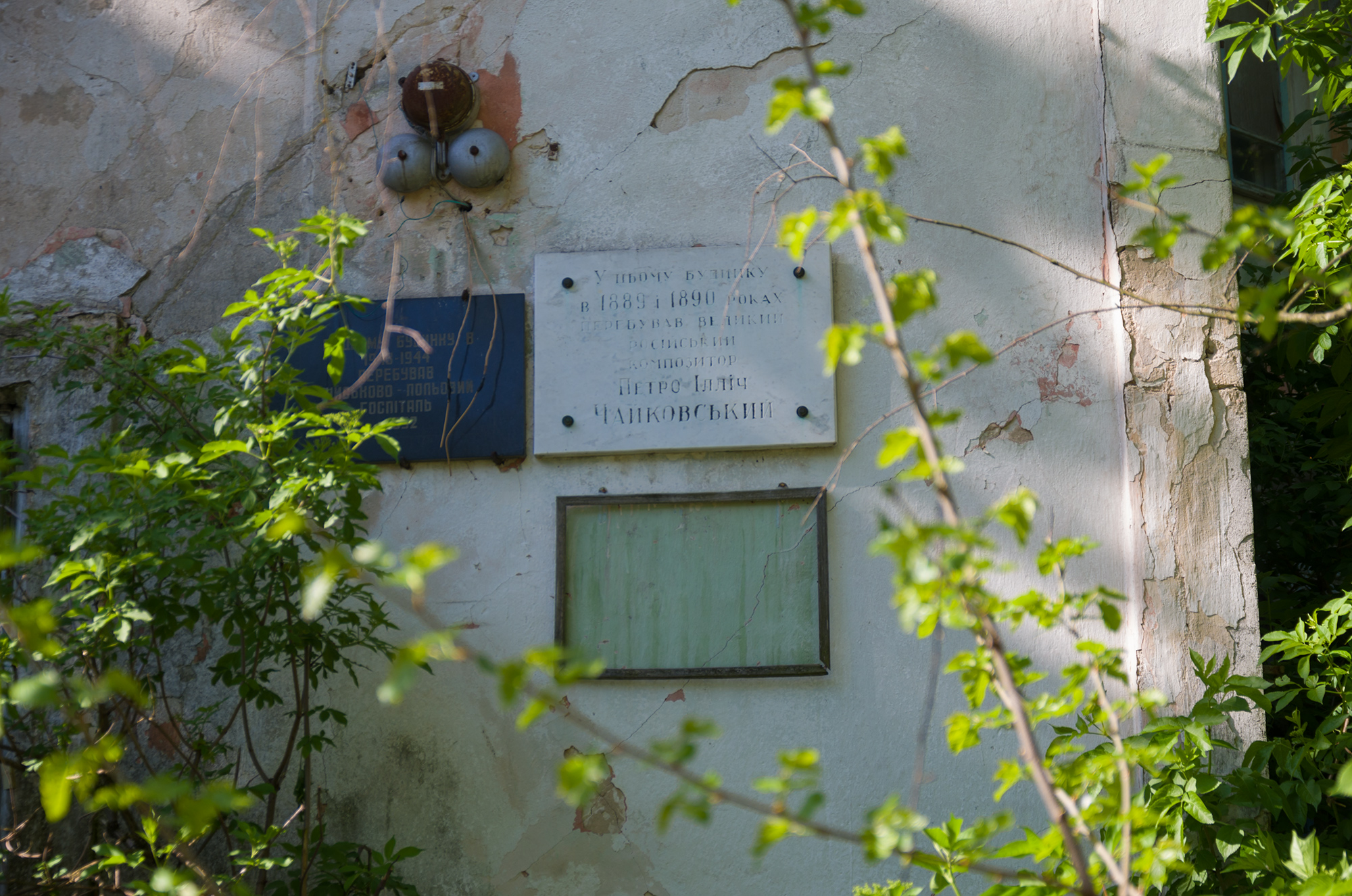 Садиба фон Мекк, Макарівський район, Копилівська сільська рада